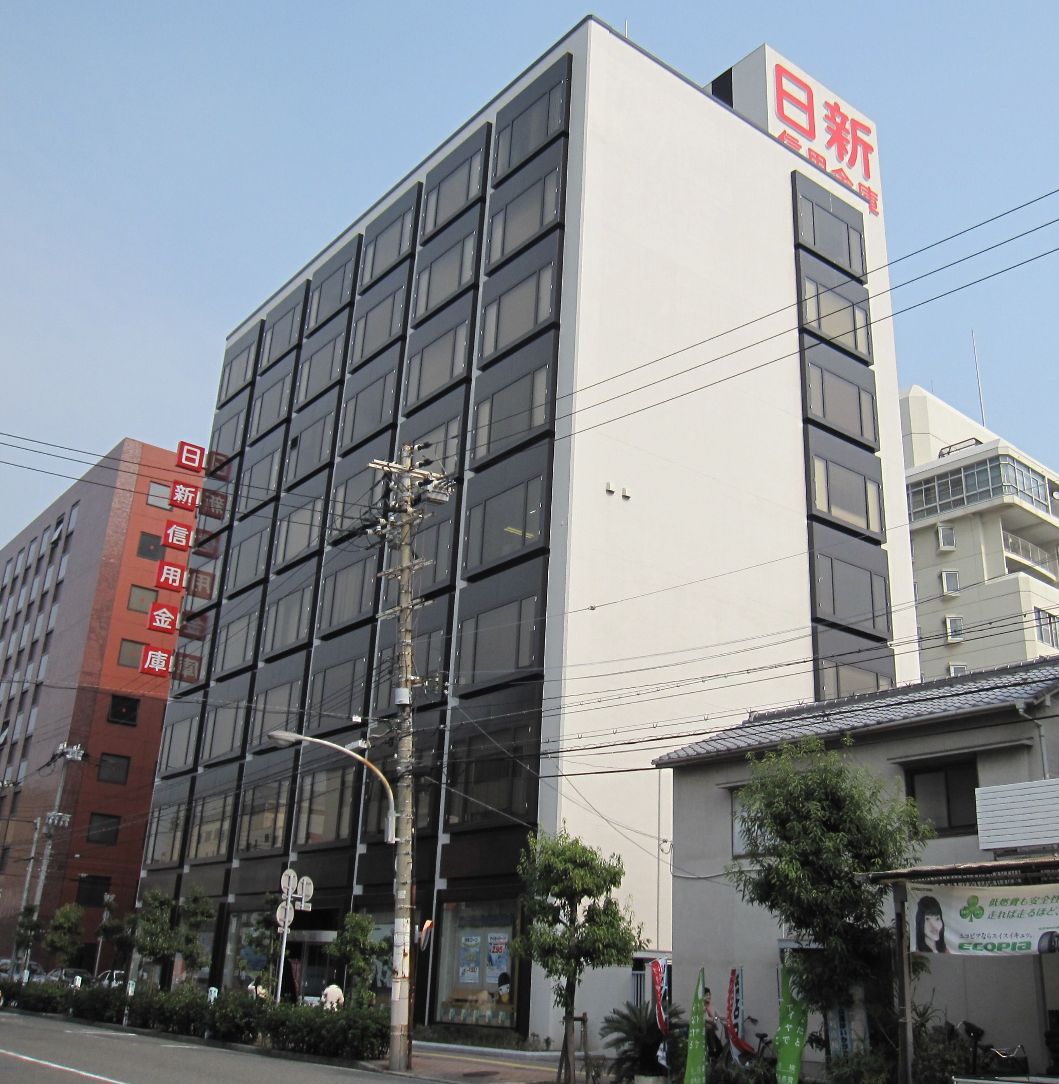 日新信用金庫本店